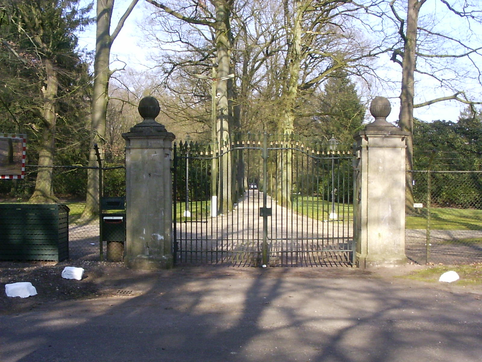 Arnhem, Westerheide, toegangshek, gemeentelijk monument